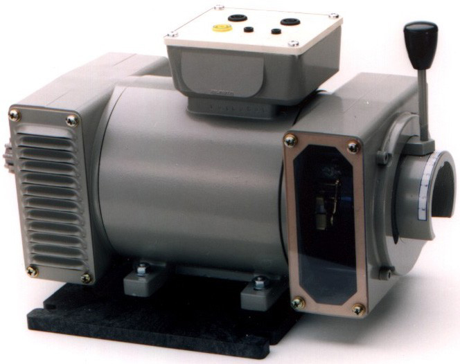 Einphasen-Repulsionsmotor,mit Einfach-Bürstenbrücke,mit Bürstenverstelleinrichtung 250 W/240 V AC